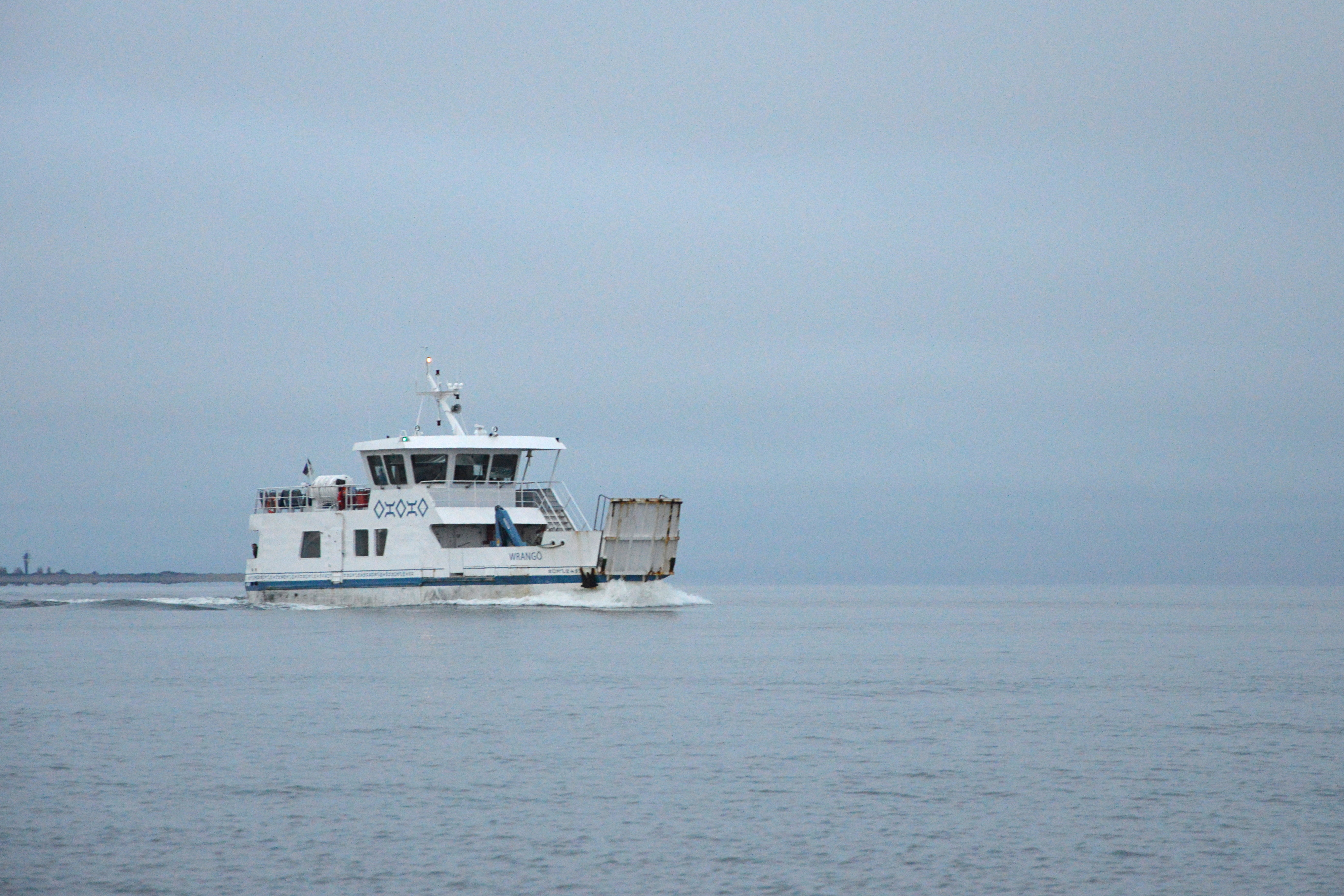 Wrangö